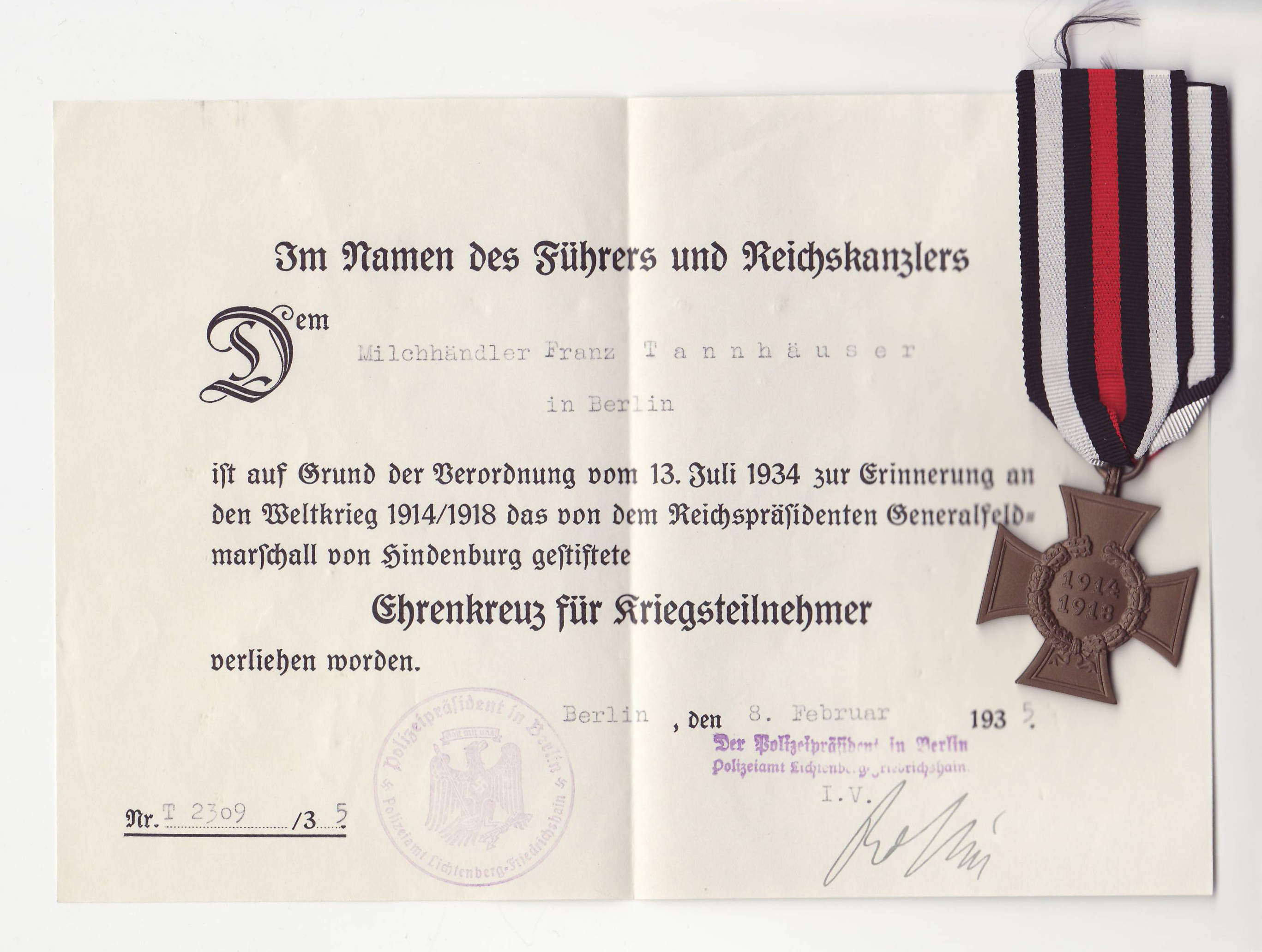 Militärische Auszeichnung Deutschland 1934 Ehrenkreuz des Weltkrieges 1914/1918, in drei Klassen, hier: 2. Ehrenkreuz für Kriegsteilnehmer.